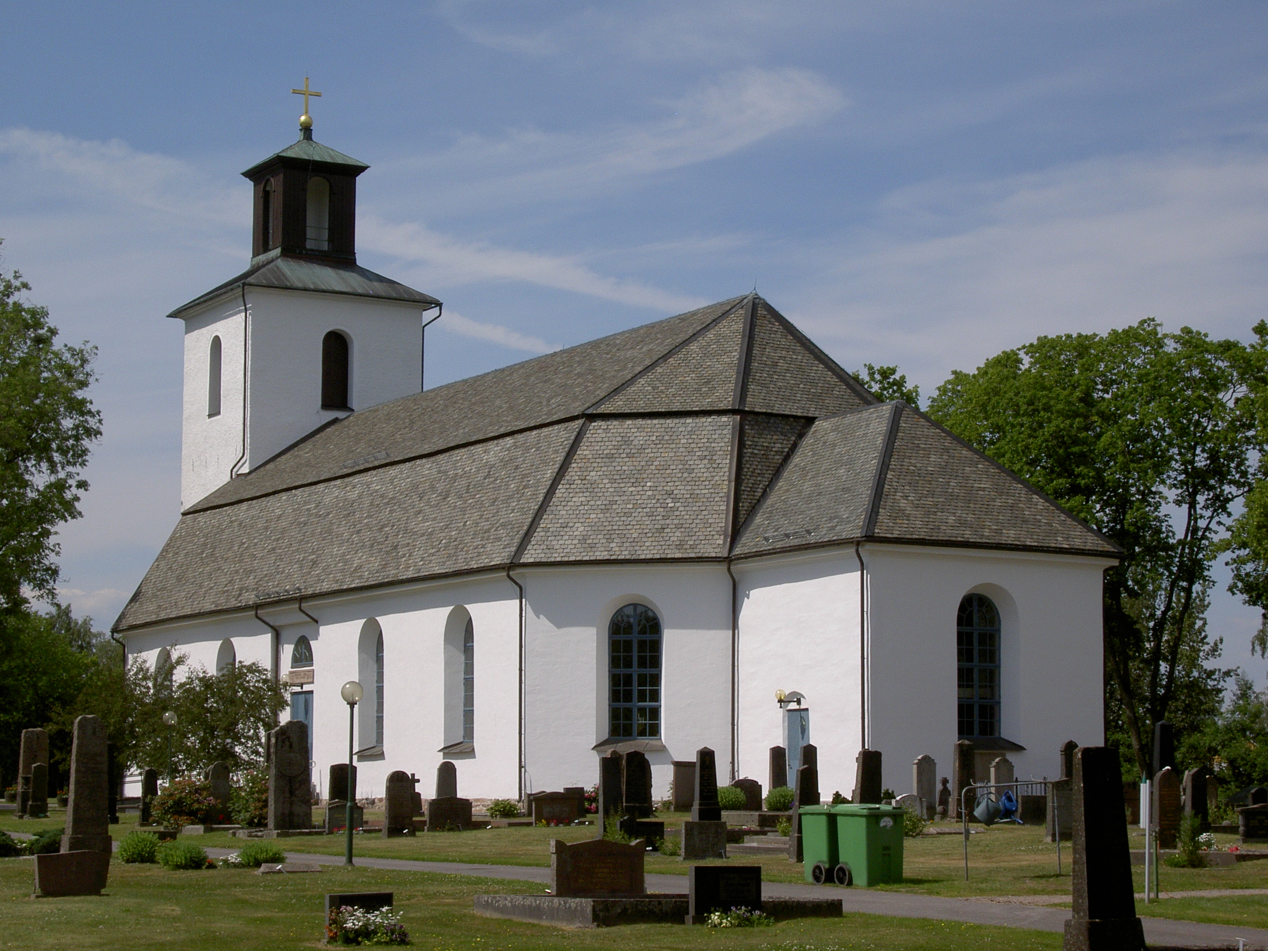 Frändefors kyrka